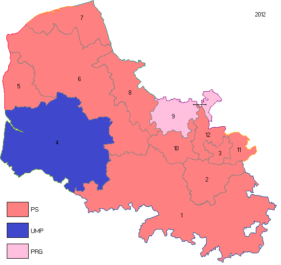 Couleur des Circonscriptions du Pas-de-Calais en 2012.